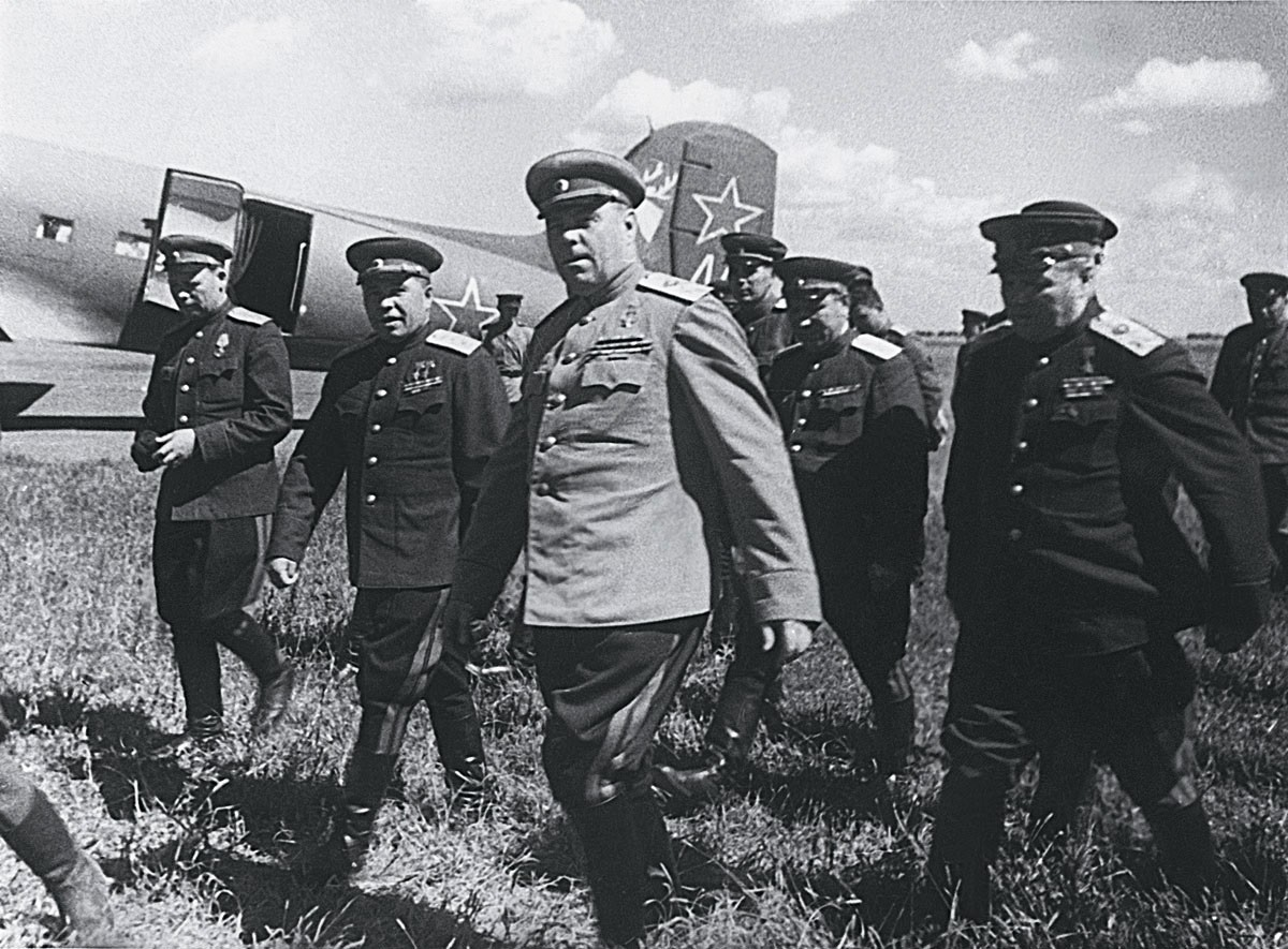 Маршал Советского Союза А.М. Василевский на взлётном поле